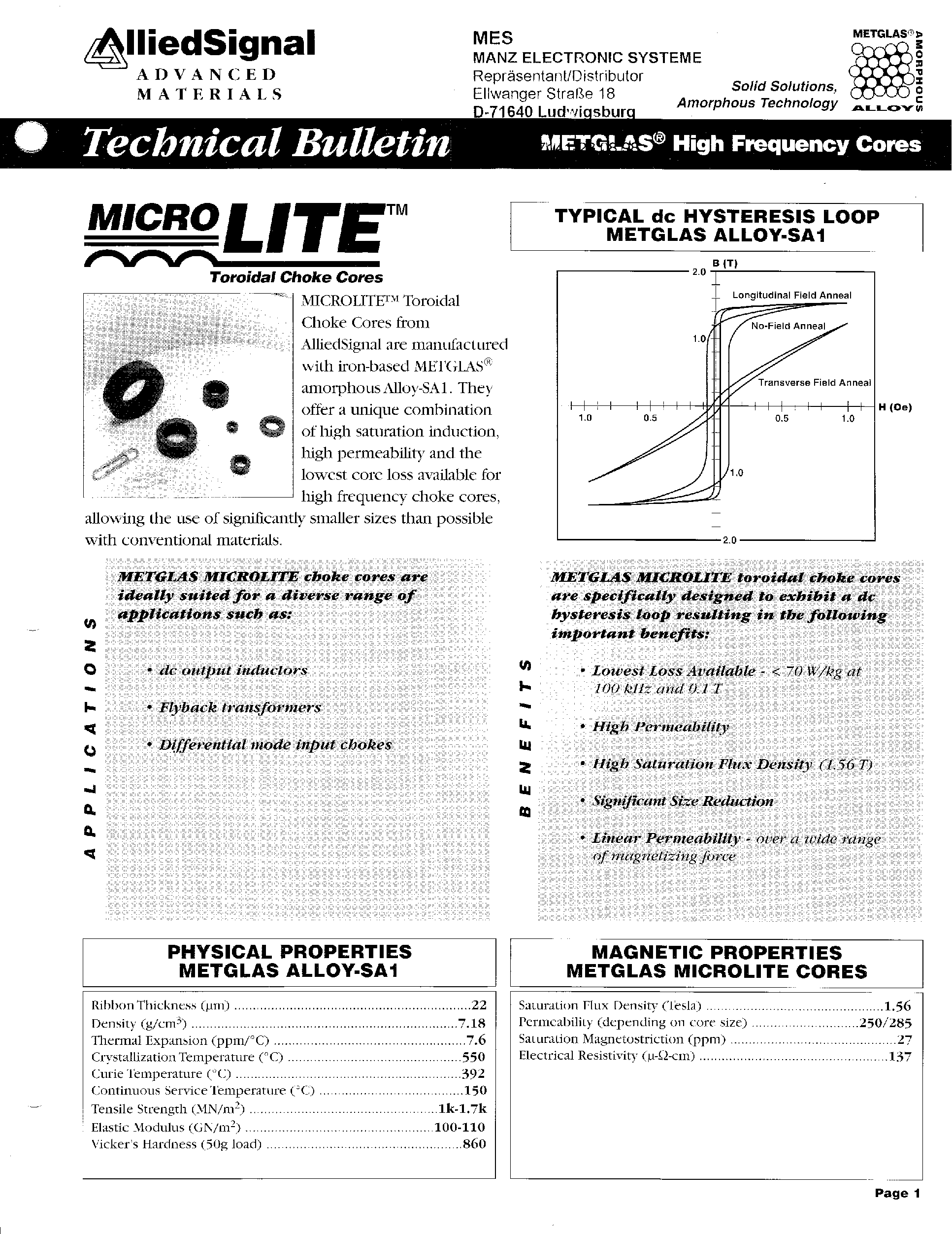 Hysteresekurven von Metallischen Gläsern